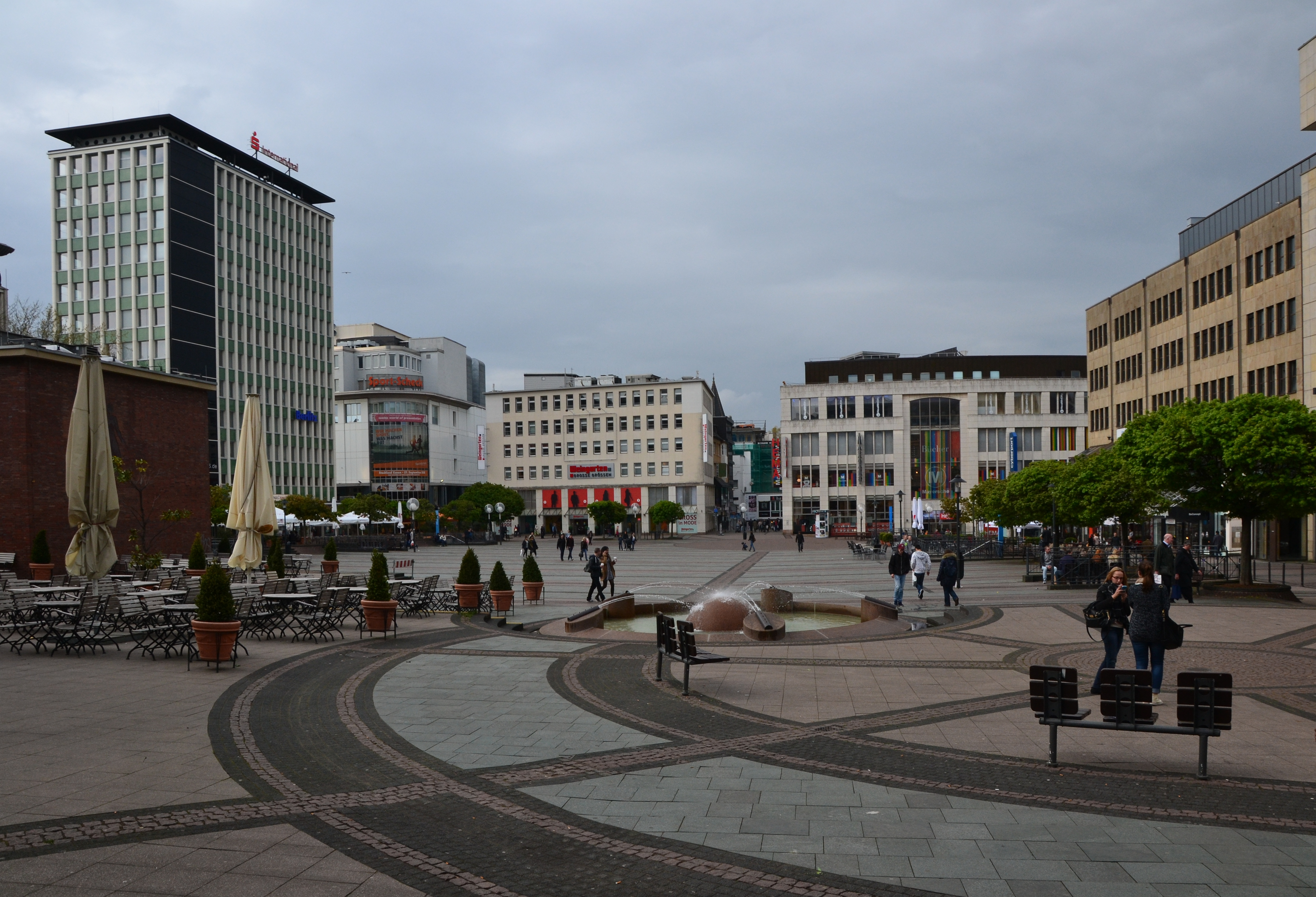 Kennedyplatz in Essen-Stadtkern, Blick nach Norden, v.l.: Gildenhaus, Eckhaus ehem. Cramer & Meermann (heute Sportcheck), ehem. Boecker-Herrenhaus, ehem. Boecker-Damenhaus (heute HEMA und Mayersche Buchhandlung), Geschäftshaus Am Markt 1